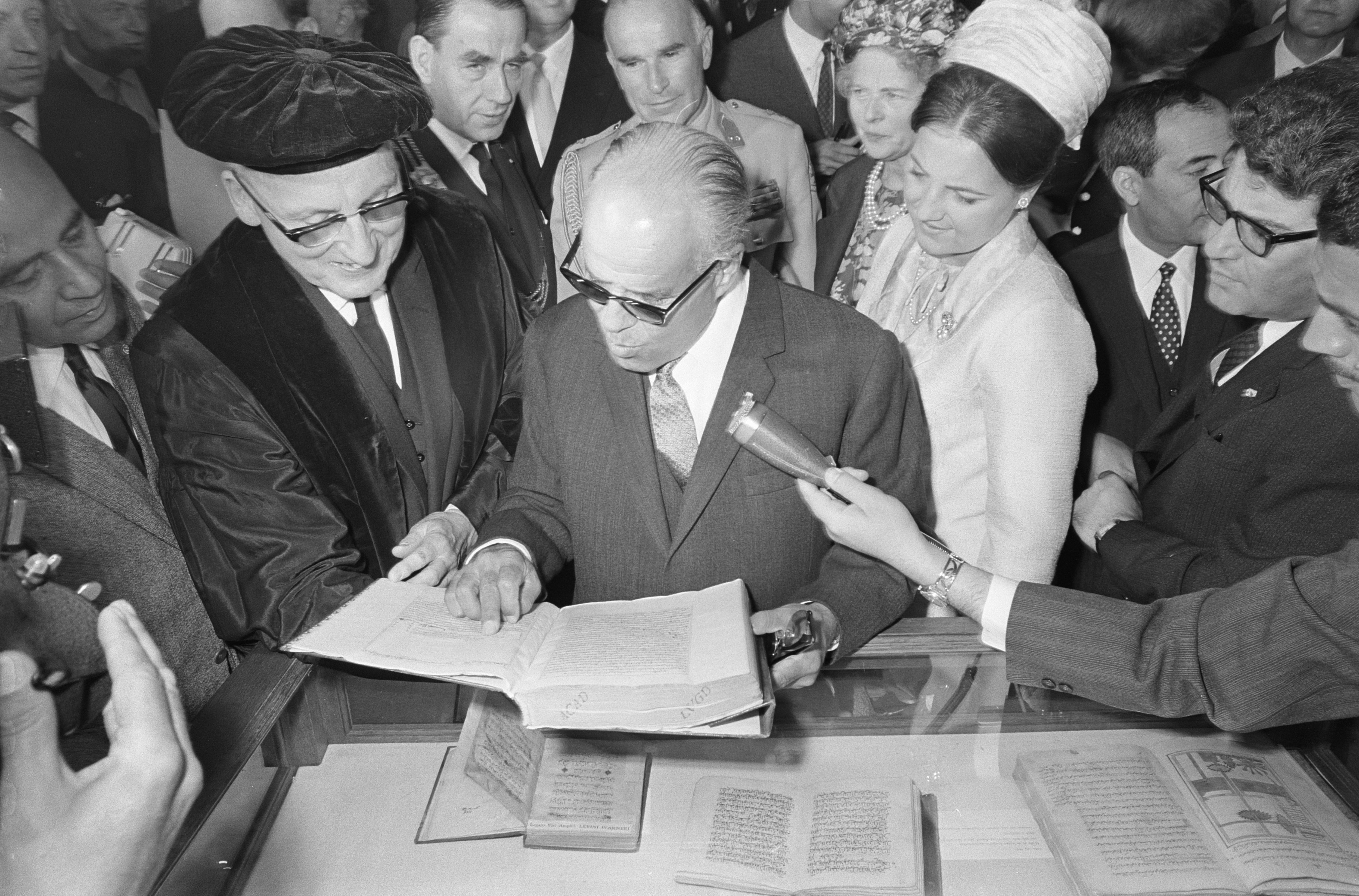 Collectie / Archief : Fotocollectie Anefo Reportage / Serie : [ onbekend ] Beschrijving : President Bourguiba en prinses Margriet brachten bezoek aan de Leidse Universiteit, in de receptiekamer, links Prof. Drewes Datum : 8 juli 1966 Trefwoorden : bezoeken, universiteiten Persoonsnaam : Bourguiba, Habib Ben Ali, Margriet, prinses, Prof. Drewes Fotograaf : Nijs, Jac. de / Anefo Auteursrechthebbende : Nationaal Archief Materiaalsoort : Negatief (zwart/wit) Nummer archiefinventaris : bekijk toegang 2.24.01.05 Bestanddeelnummer : 919-3360